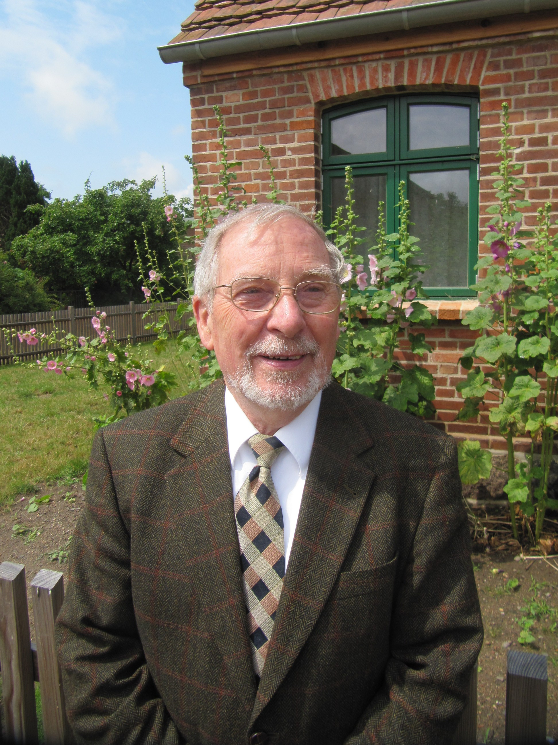 Fotografie von Jürgen Andrees